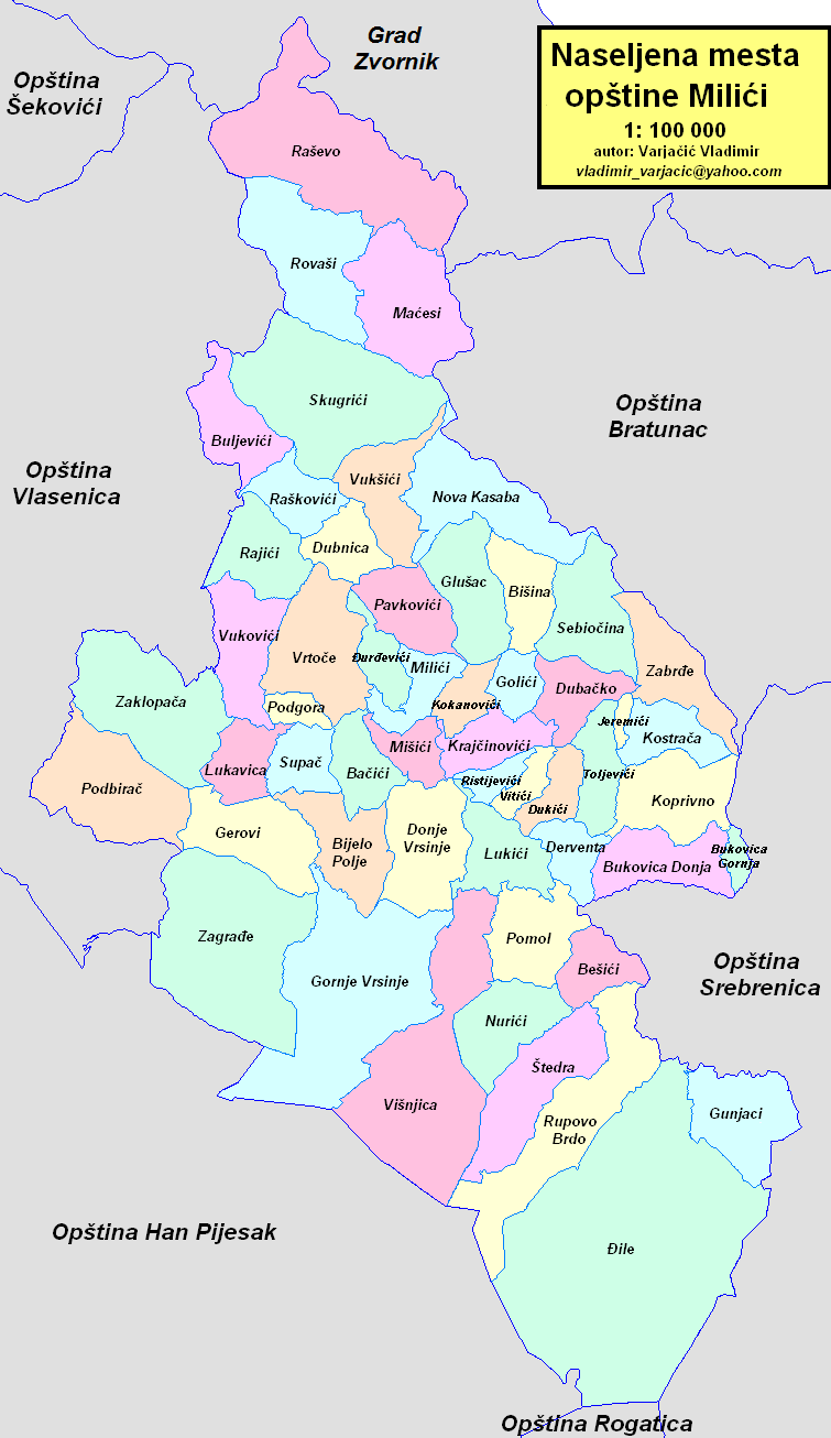 Opština Milići